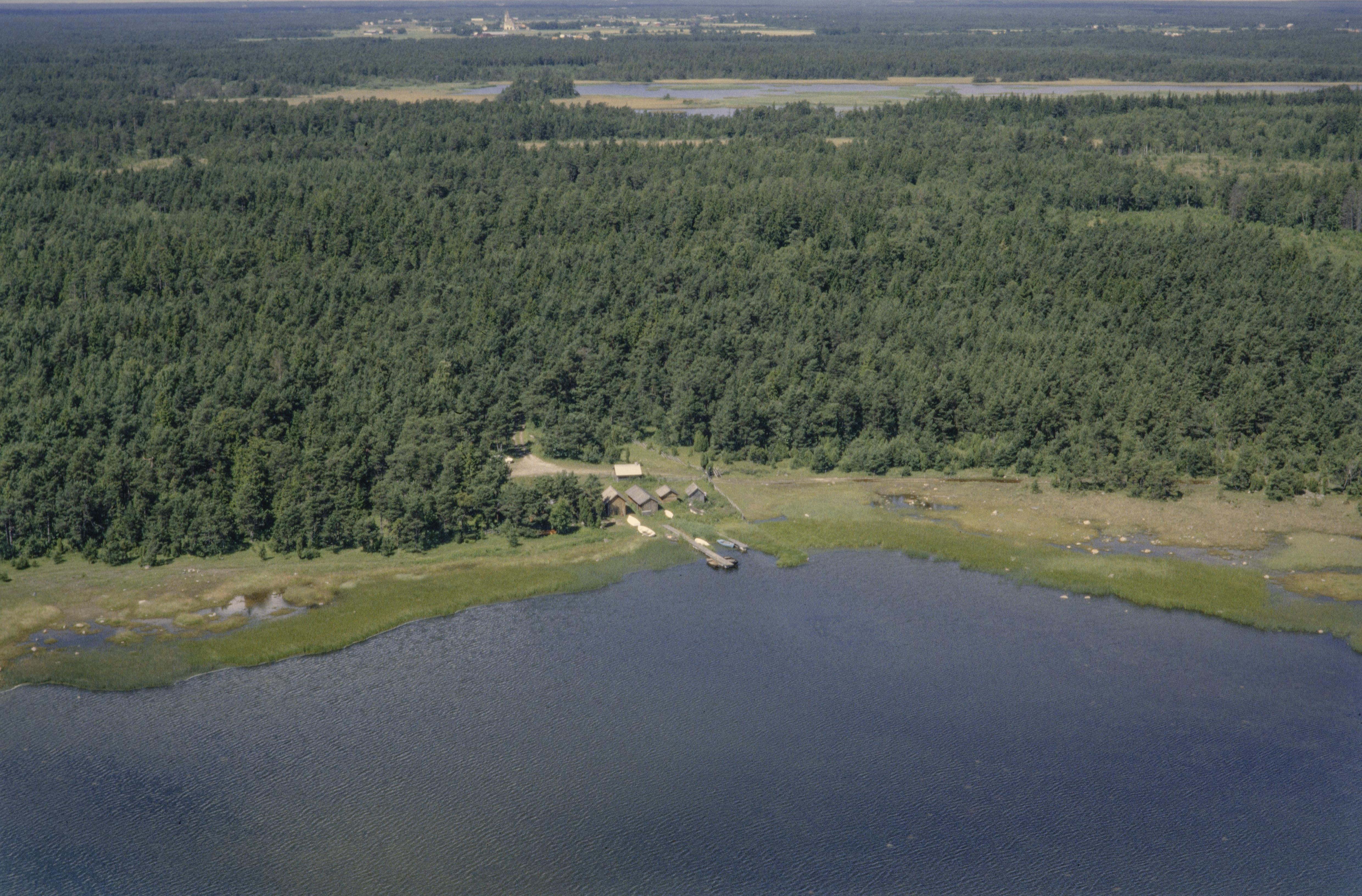 Motiv: Agbod fiskeläge Nyckelord: Flygbilder, Riksintressen Kategori: Fiskeläge Agbod fiskeläge